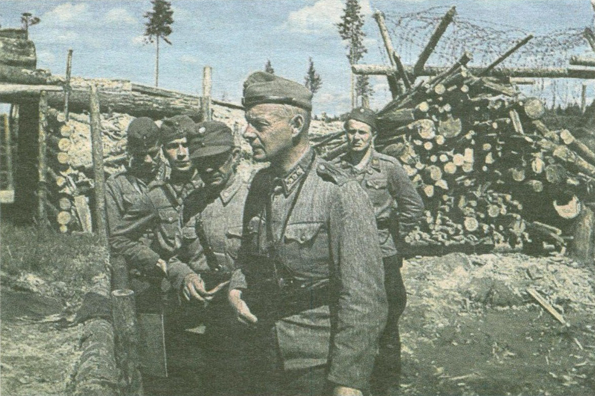 Överste Gustaf Snellman, major Väänänen, löjtnant Aulanko och löjtnant Nuutilainen med sergeant Syväri i oktober 1943.